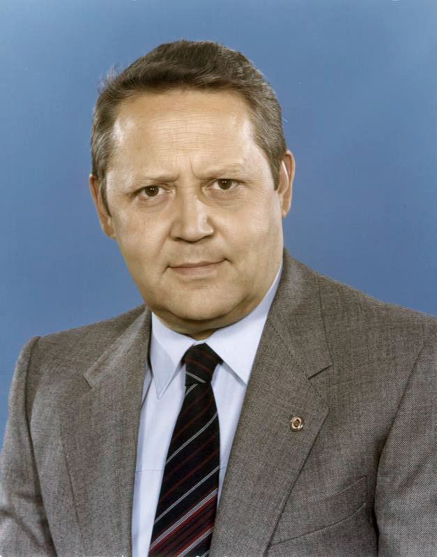 ADN-ZB/Dewag/25.11.1985 Günter Schabowski, Mitglied des Politbüros des ZK der SED und 1. Sekretär der Bezirksleitung Berlin der SED Aufnahme: 4.5.1982